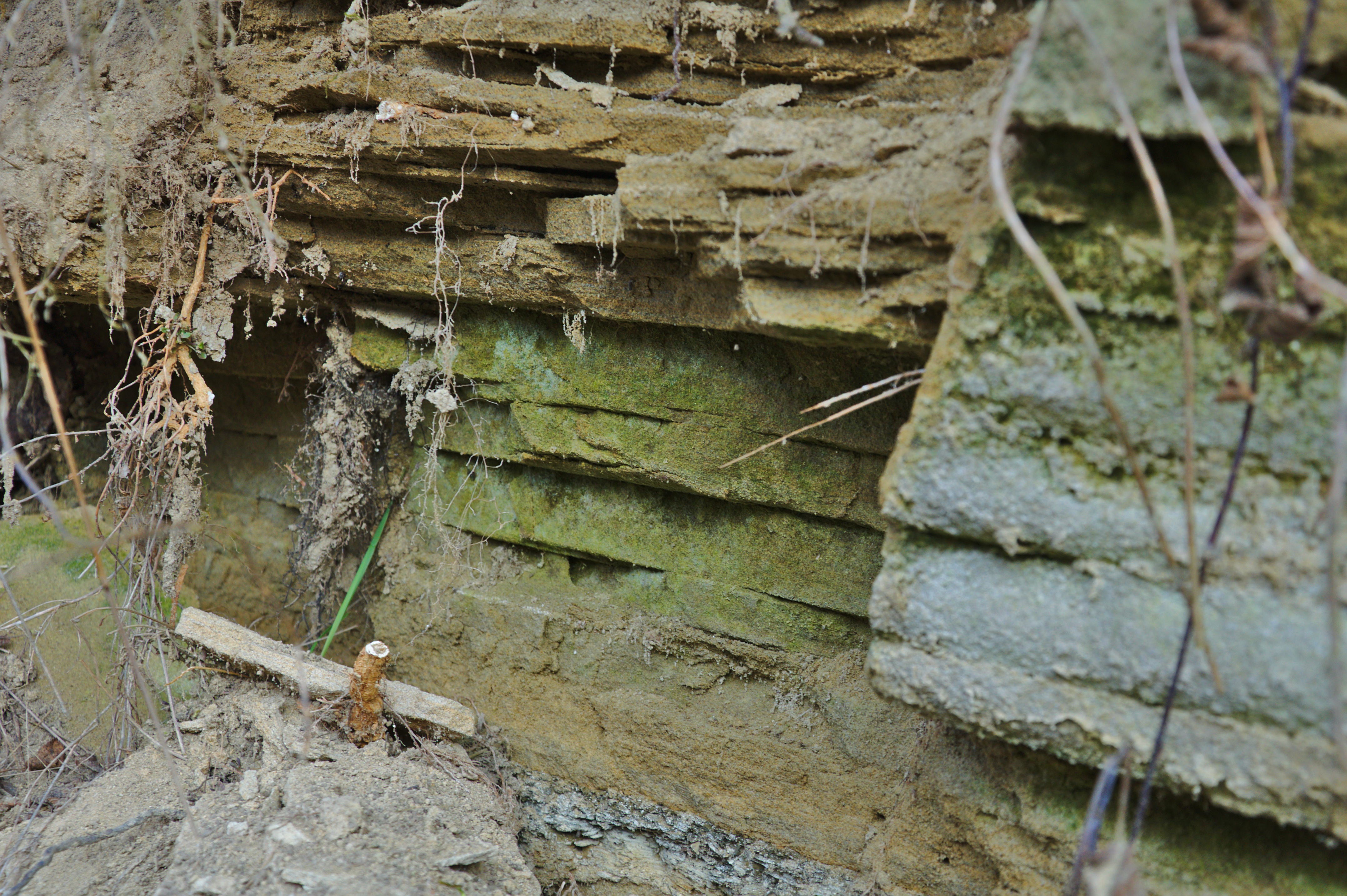 Národní přírodní památka Na Adamcích, okres Hodonín